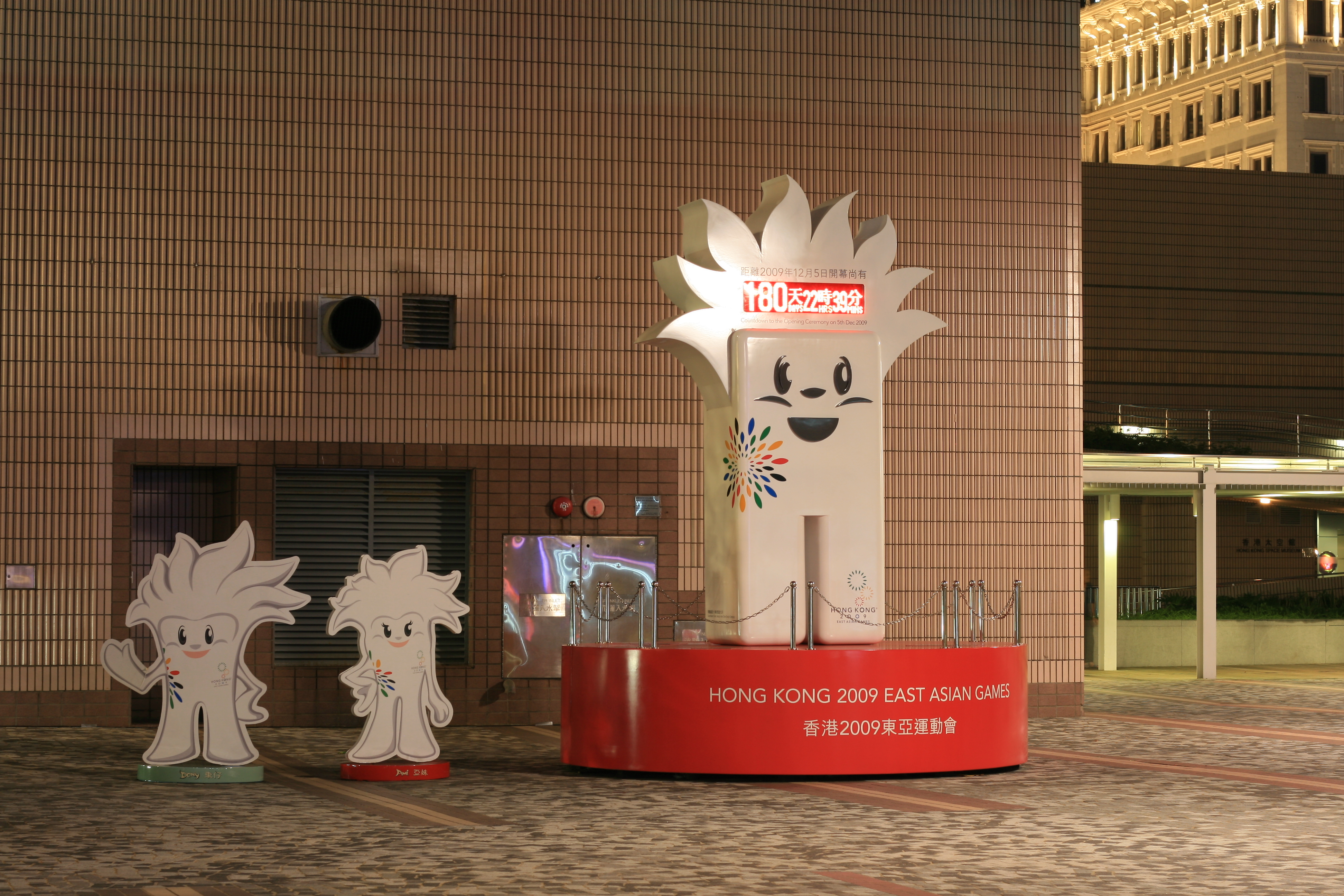 2009年東亞運動會大型倒數時計，攝於香港尖沙咀文化中心。